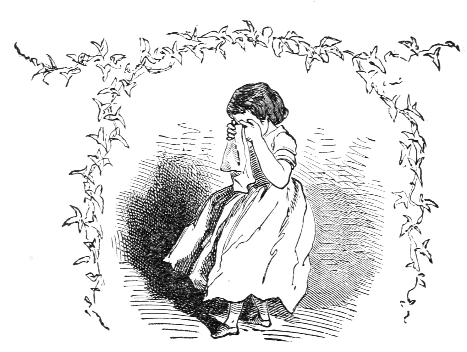 Illustration for "Les Malheurs de Sophie"